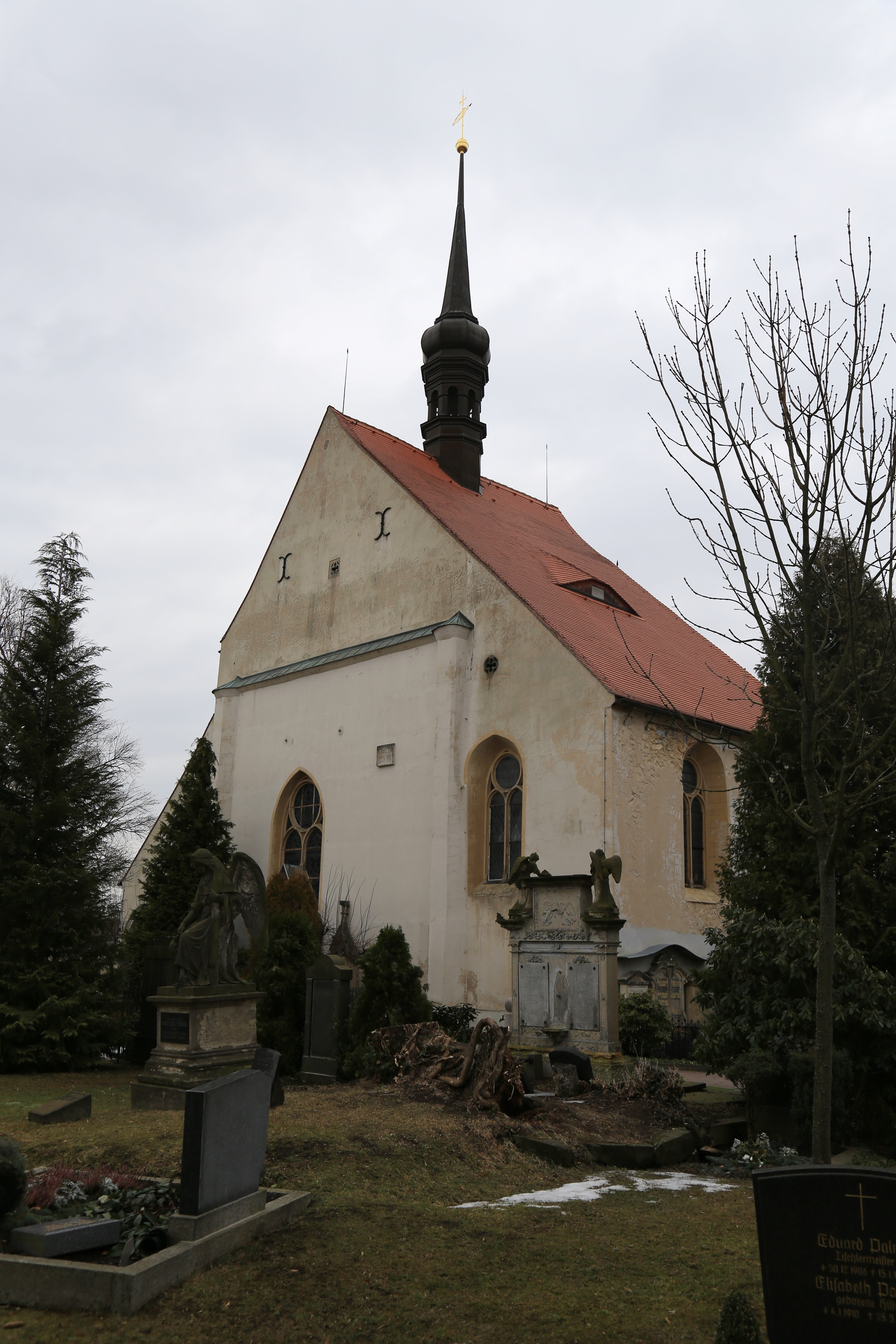 Zittau Frauenkirche (17)